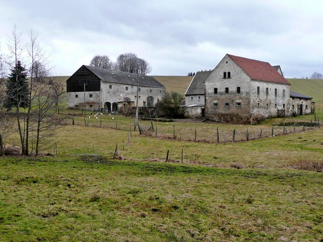 Bauernhof in Waltersdorf bei Liebstadt